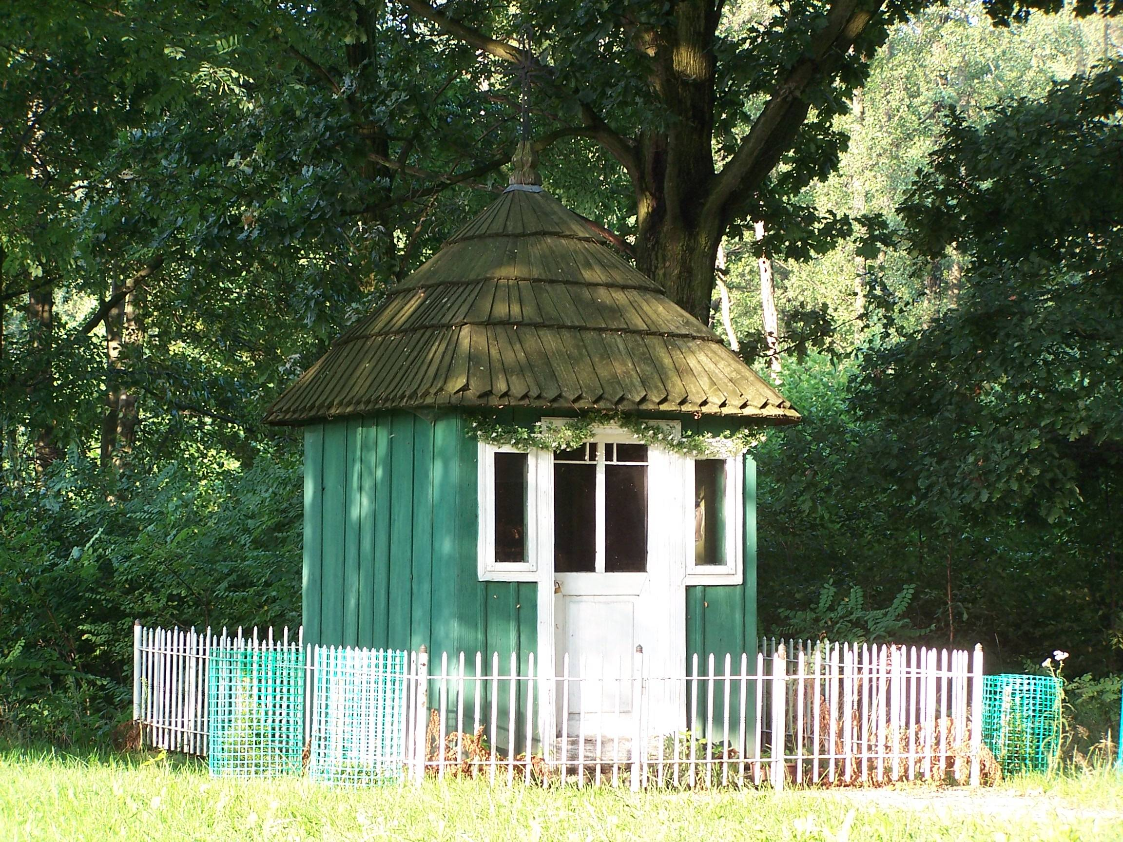 Kapliczka Domkowa z 1830 roku w Górnie koło Rzeszowa. Fot. Kazimierz S. Ożóg